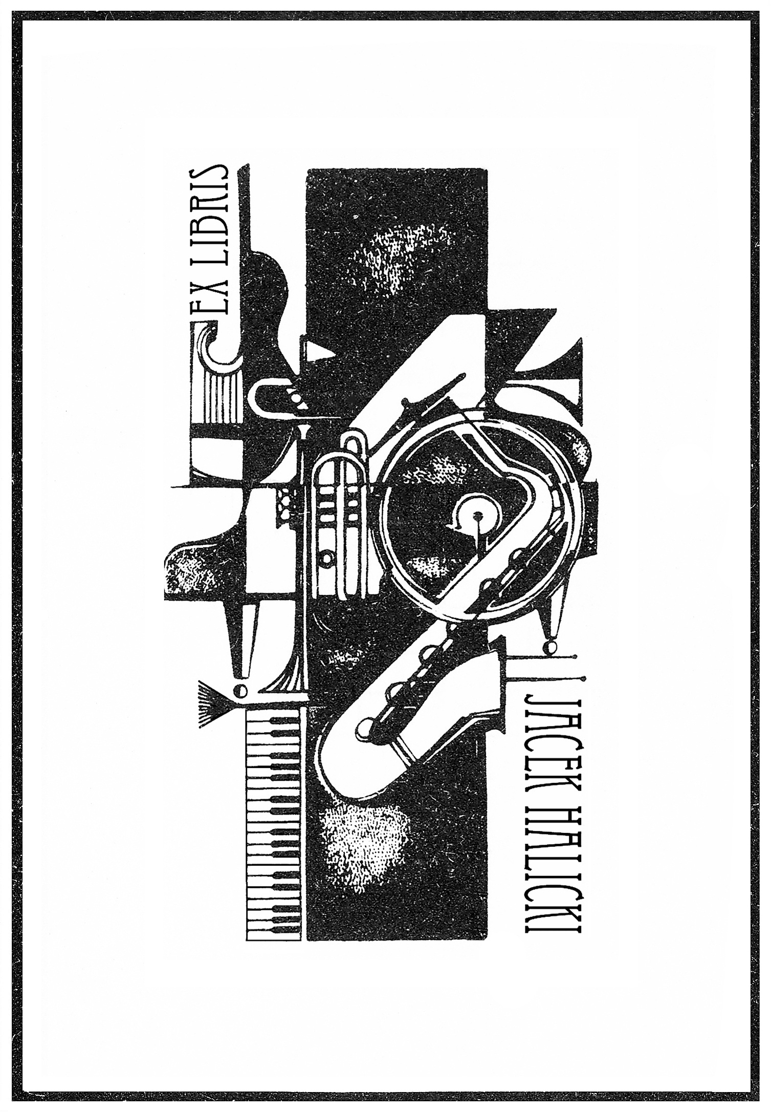 Ekslibris Jacka Halickiego